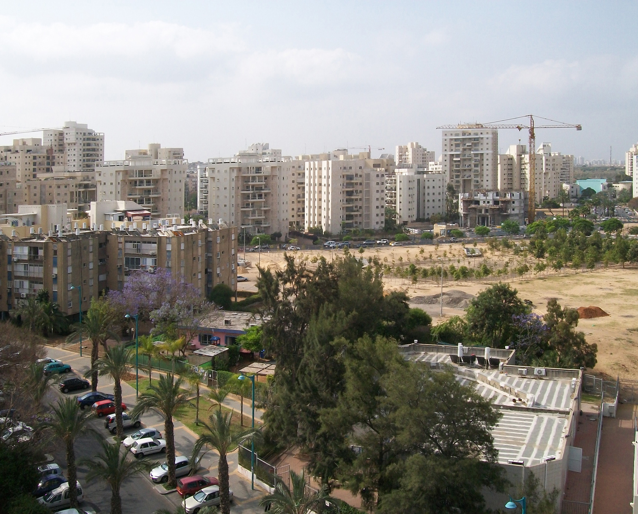 Holon Panorama miasta 2010